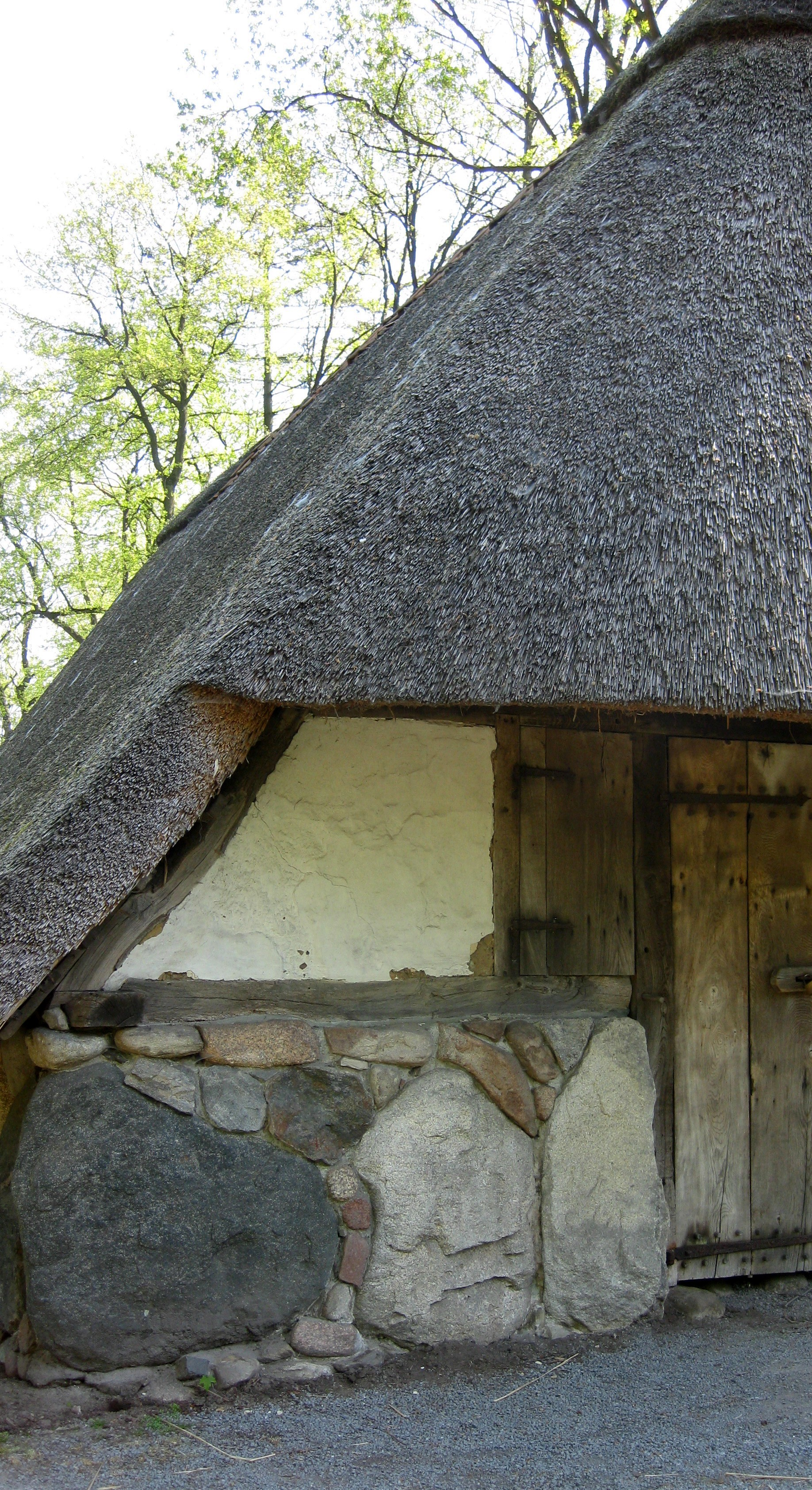 Steinfundament und Schafstall im Museumsdorf Cloppenburg